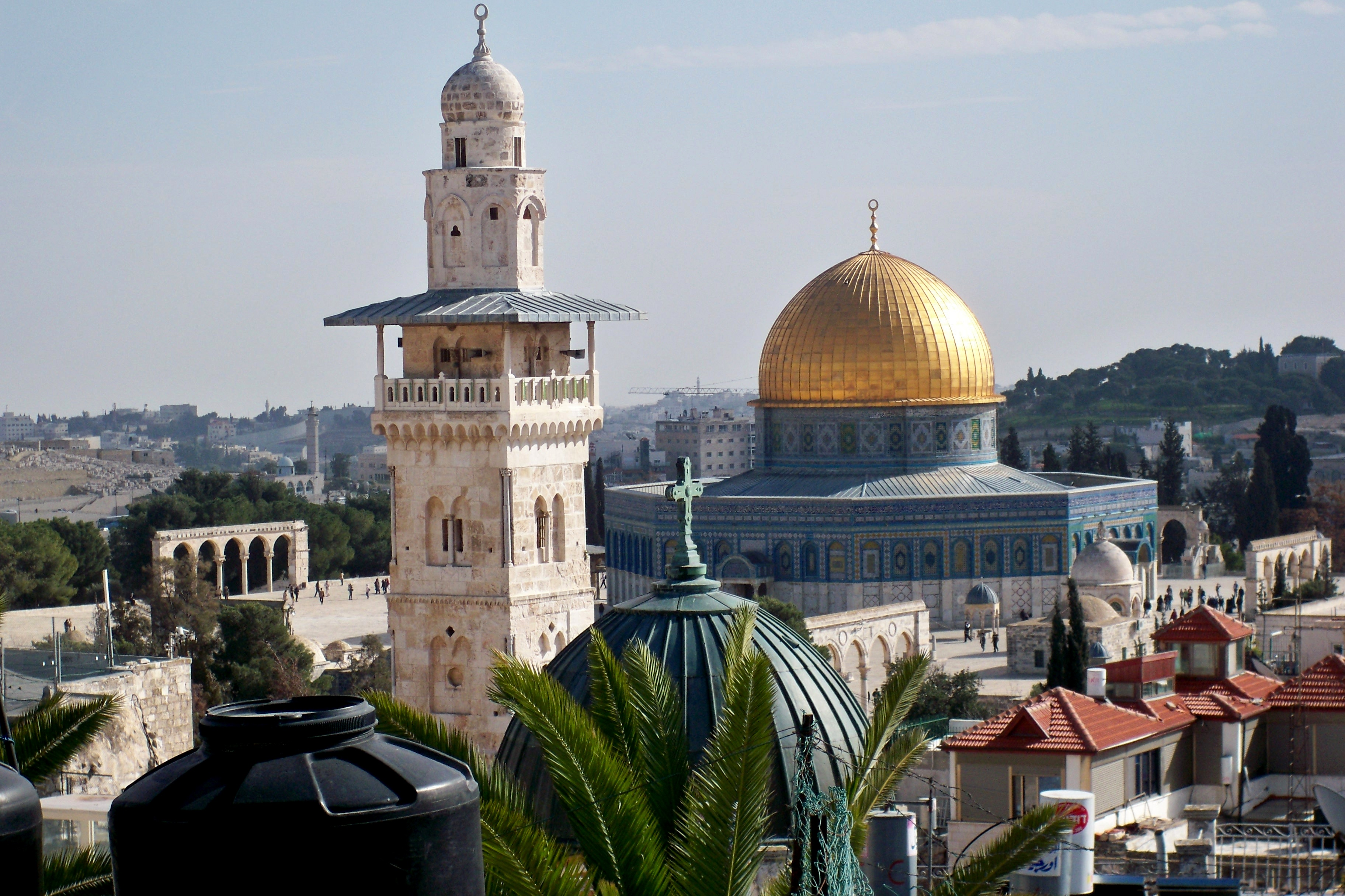 تبين الصورة مئذنة الغوانمة التي تقع على الرواق الشمالي للمسجد الأقصى المبارك، في أقصى غربه، قرب باب الغوانمة. 100_6031 Jerusalem